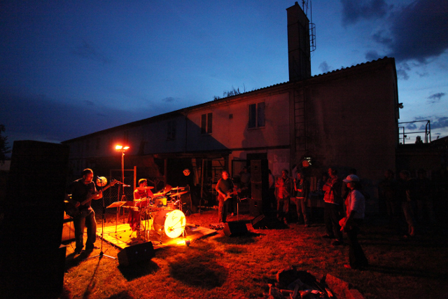 20.5.2011 - Dům Matky Terezy - vystoupení hudební skupiny Spektrum